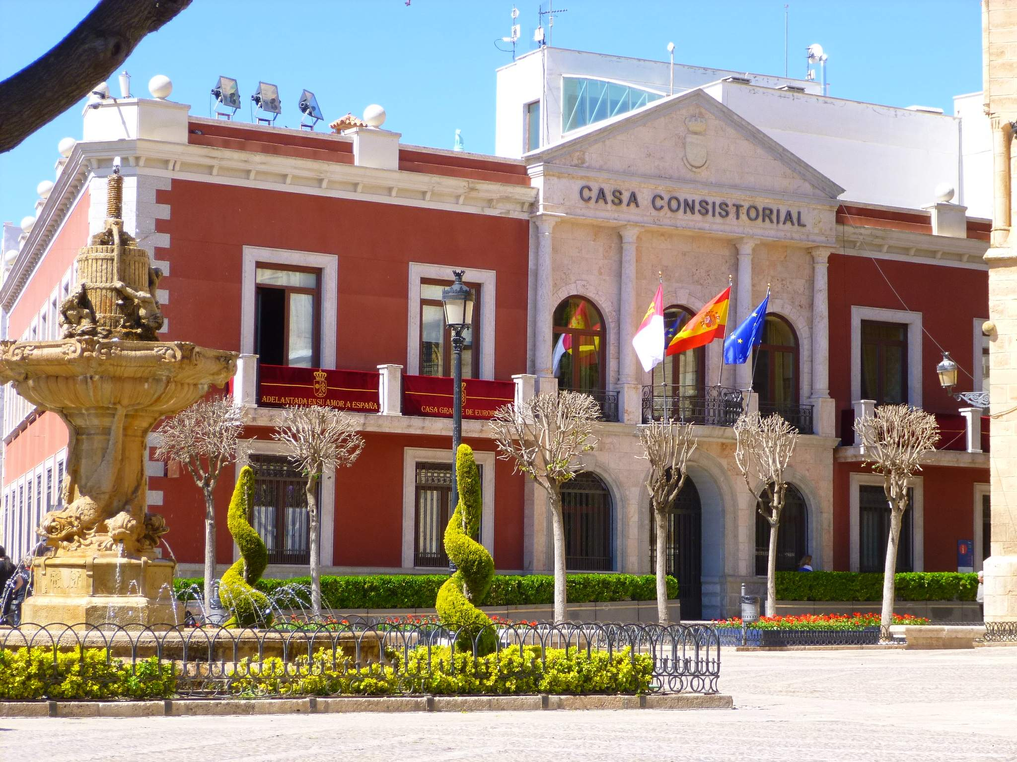 Ayuntamiento de Valdepeñas (Ciudad Real)